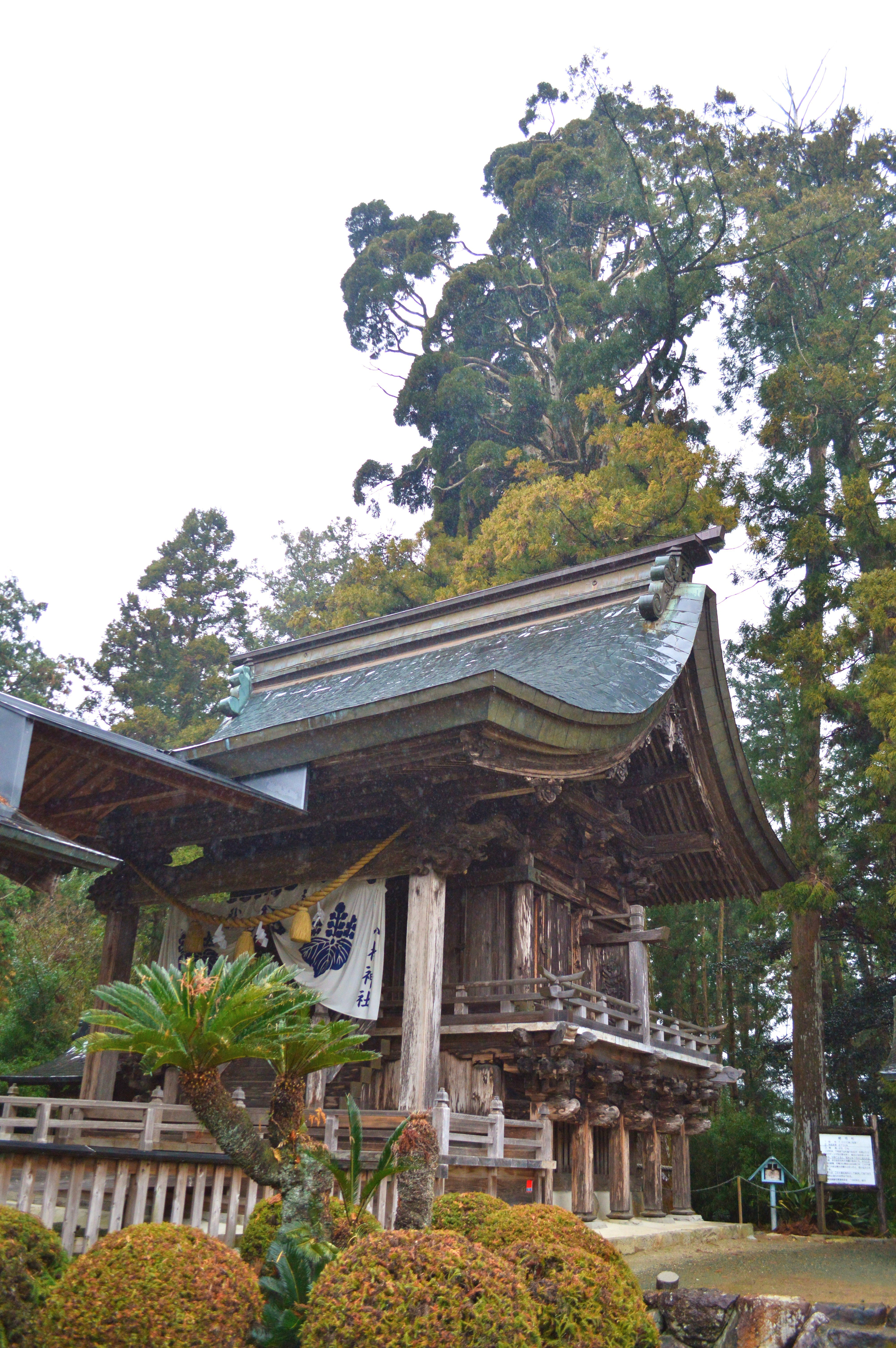 小村神社 本殿